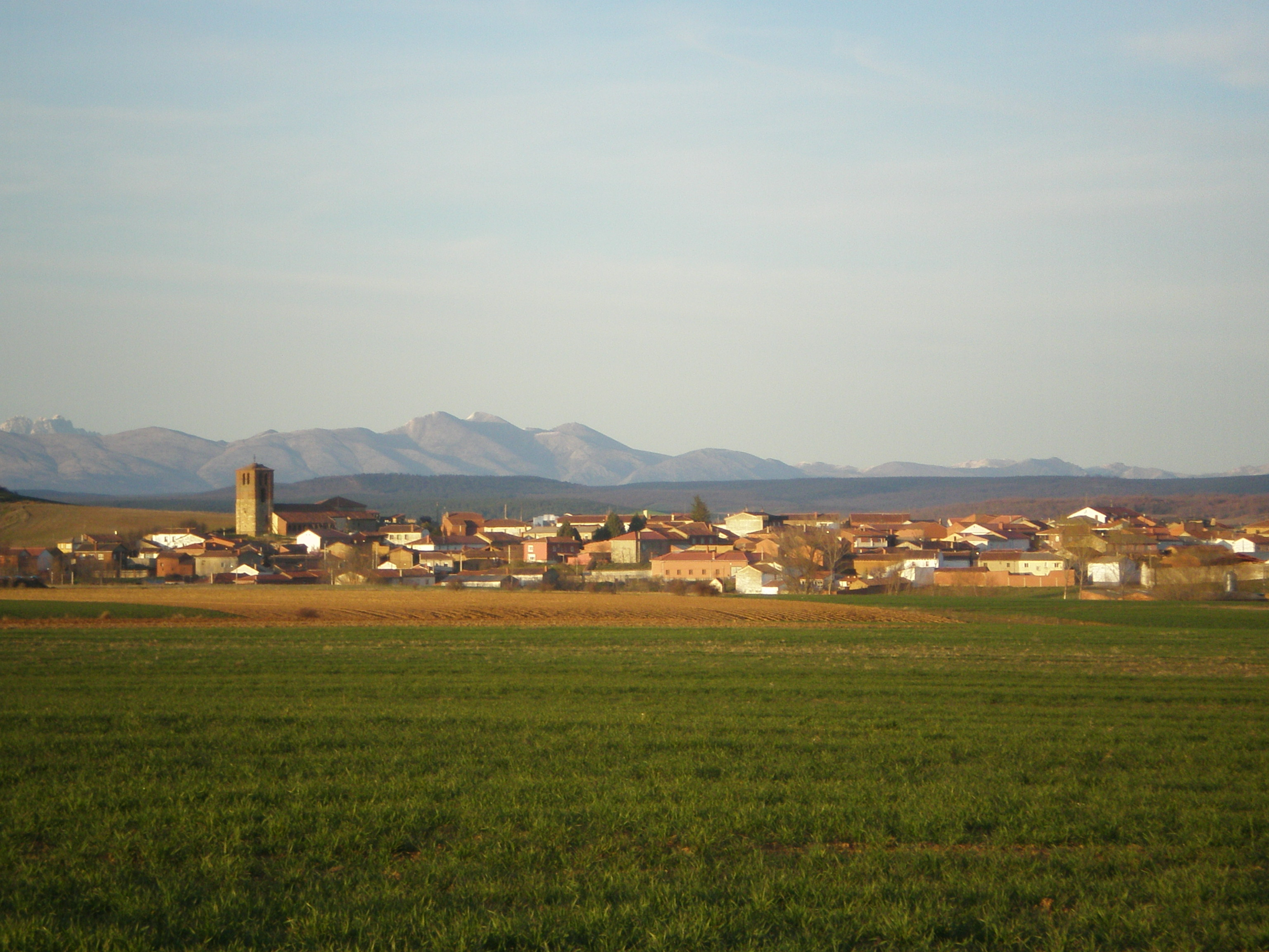 Villamartín de Don Sancho (León, Spain)